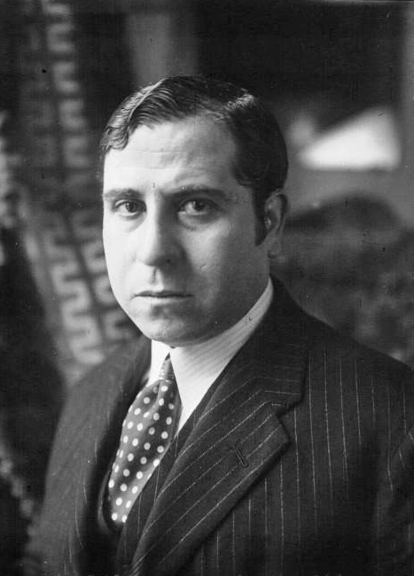 Ramón Gómez de la Serna, écrivain espagnol : photographie de presse